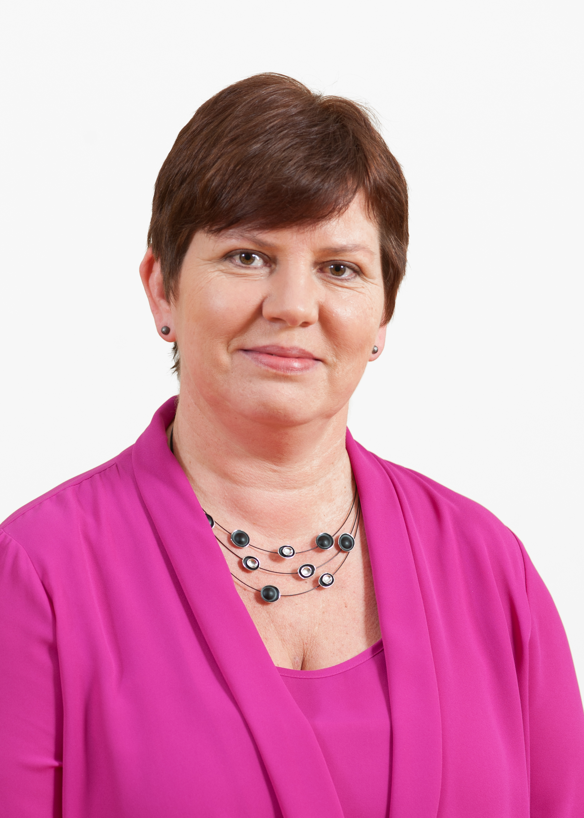 Terje Trei